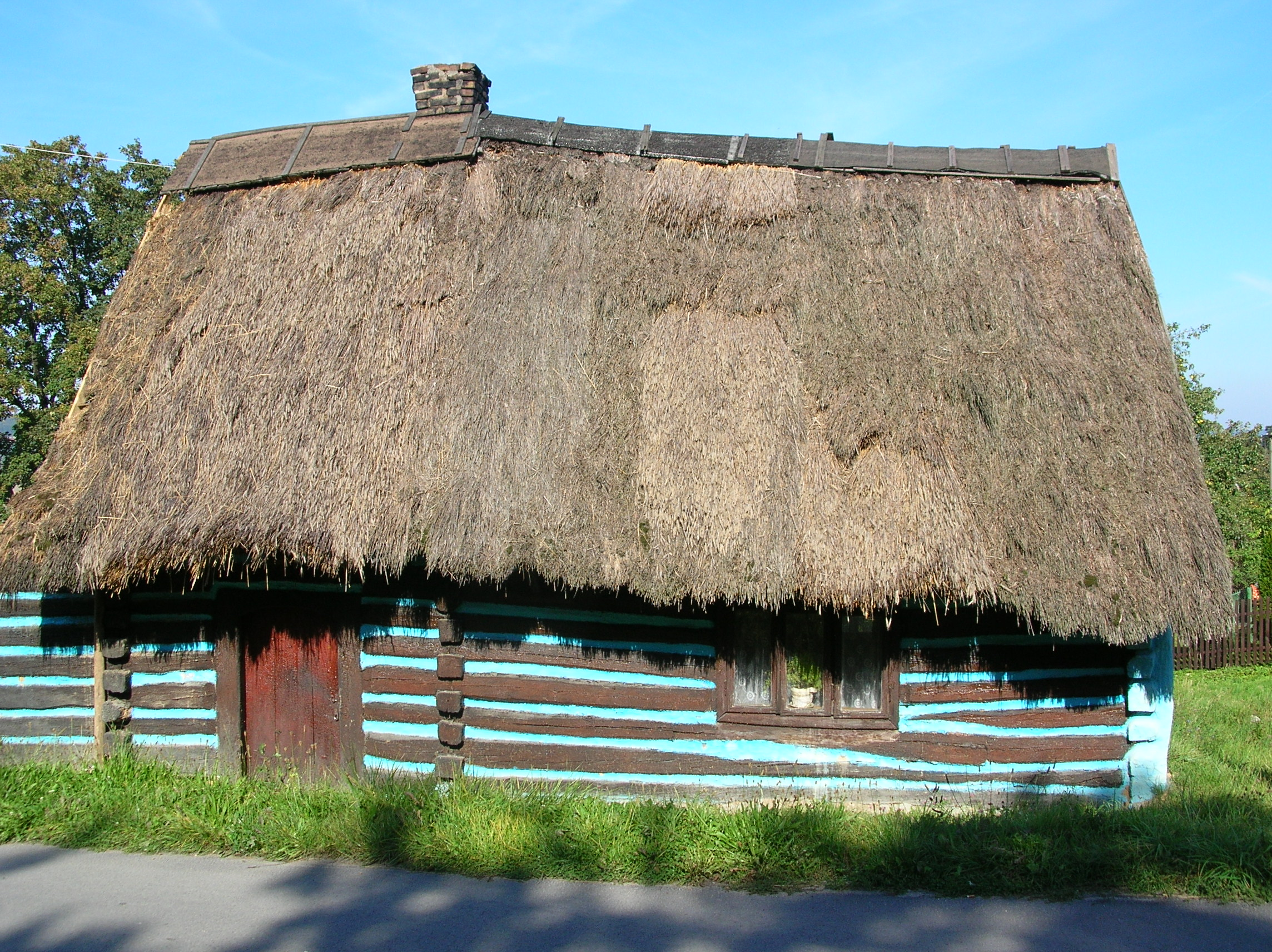 Drewniany dom we wsi Nawojowa Góra